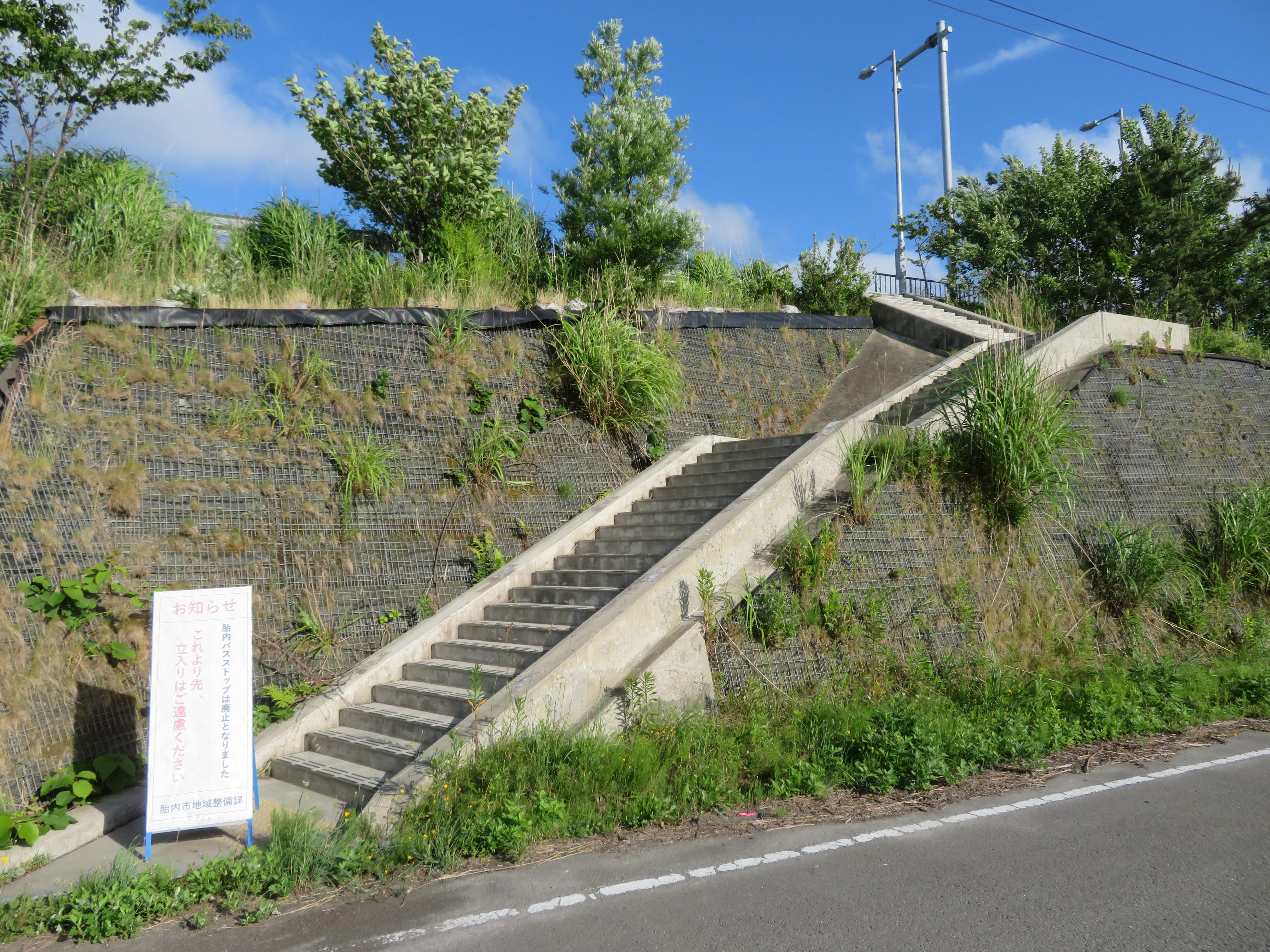 新潟県胎内市にある日本海東北自動車道胎内バスストップ（村上方面側入口）付近 Canon PowerShot SX720 HS